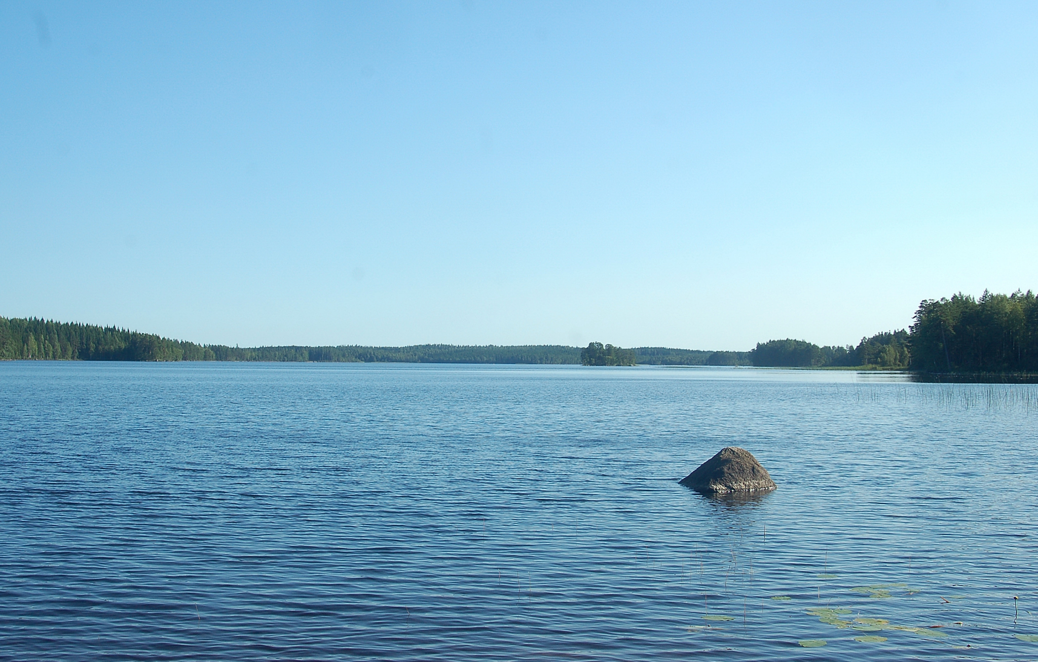 Norra spetsen av Säfsjön i Degerfos